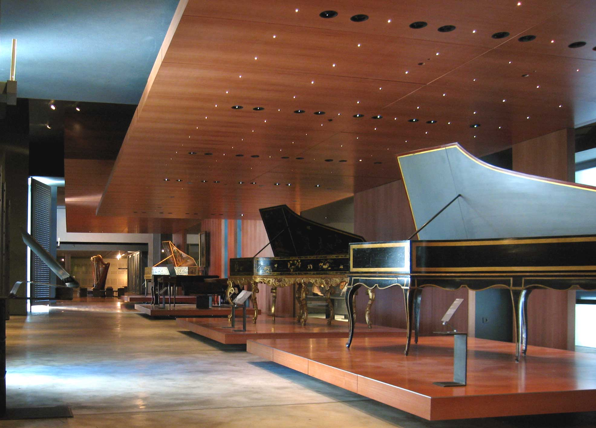 Description : Musee de la Musique de Paris Place : Parc de la Villette, Paris, France Date : juillet 2006 Auteur : Pline photo personnelle